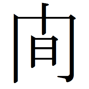 「間」の略字。日本で使用される。